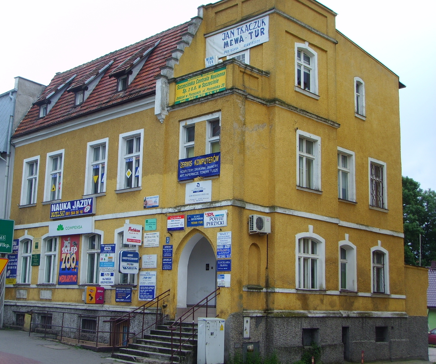 W tym budynku mieścił się Powiatowy Urząd Bezpieczeństwa Publicznego